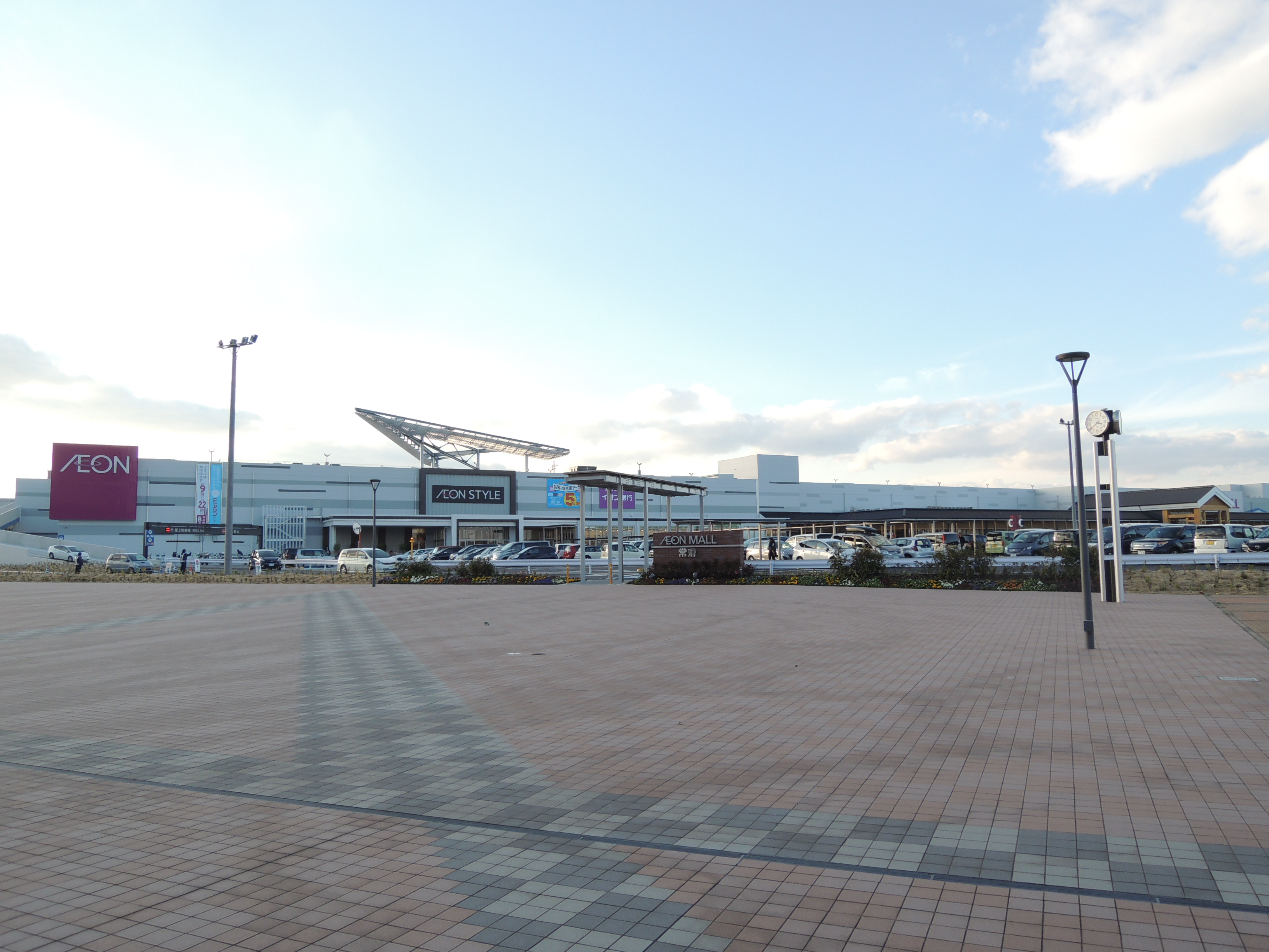 イオンモール常滑 外観 りんくう常滑駅北口から